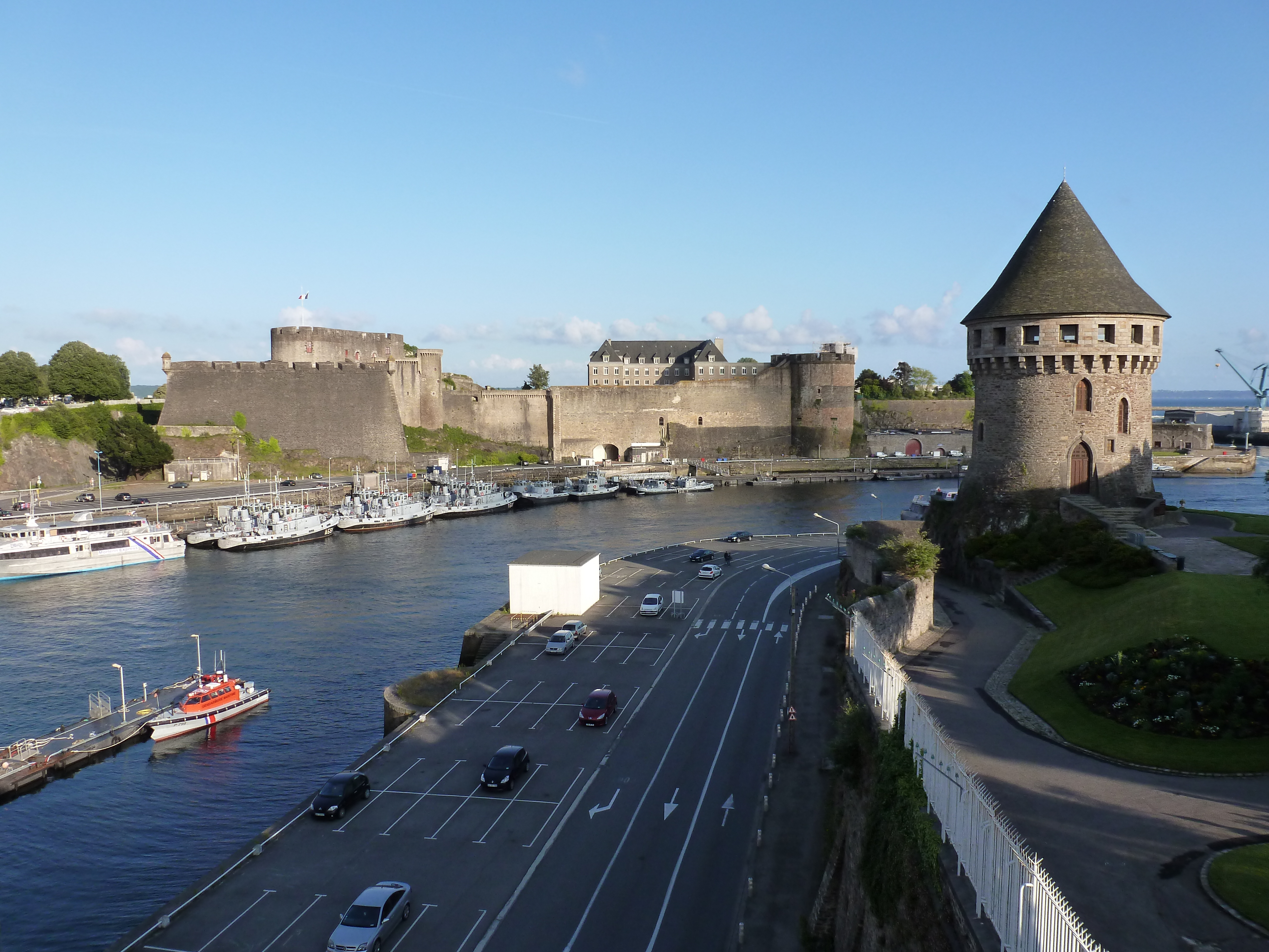 Le château de Brest vu depuis le pont de Recouvrance.